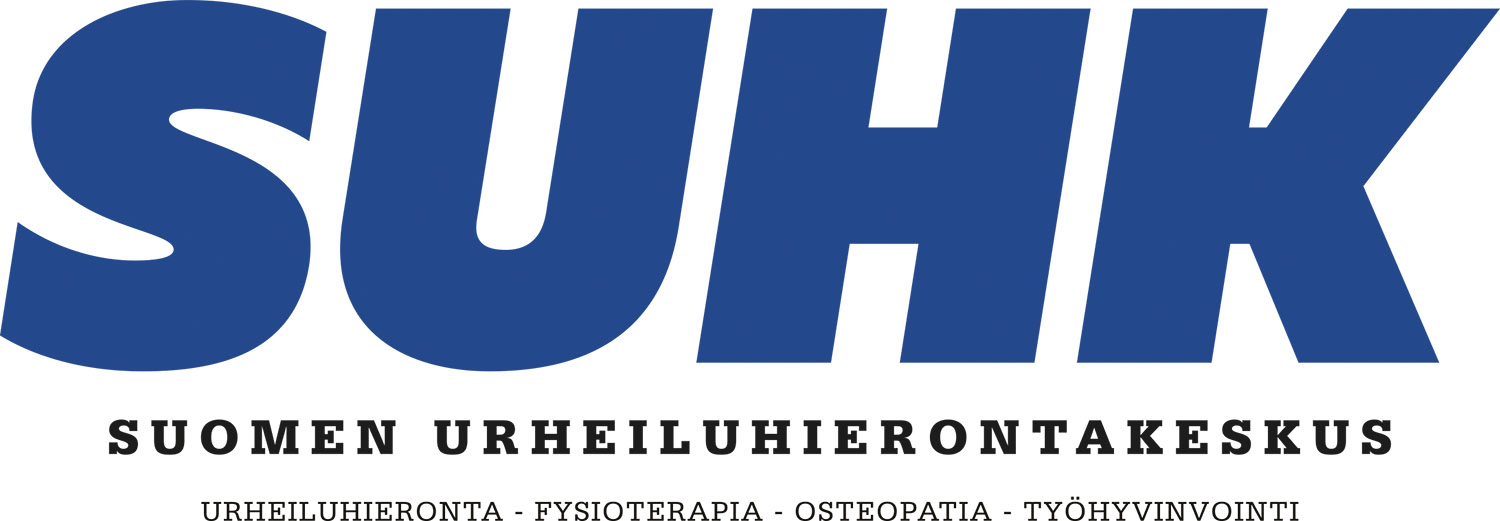 Suomen Urheiluhierontakeskuksen logo.